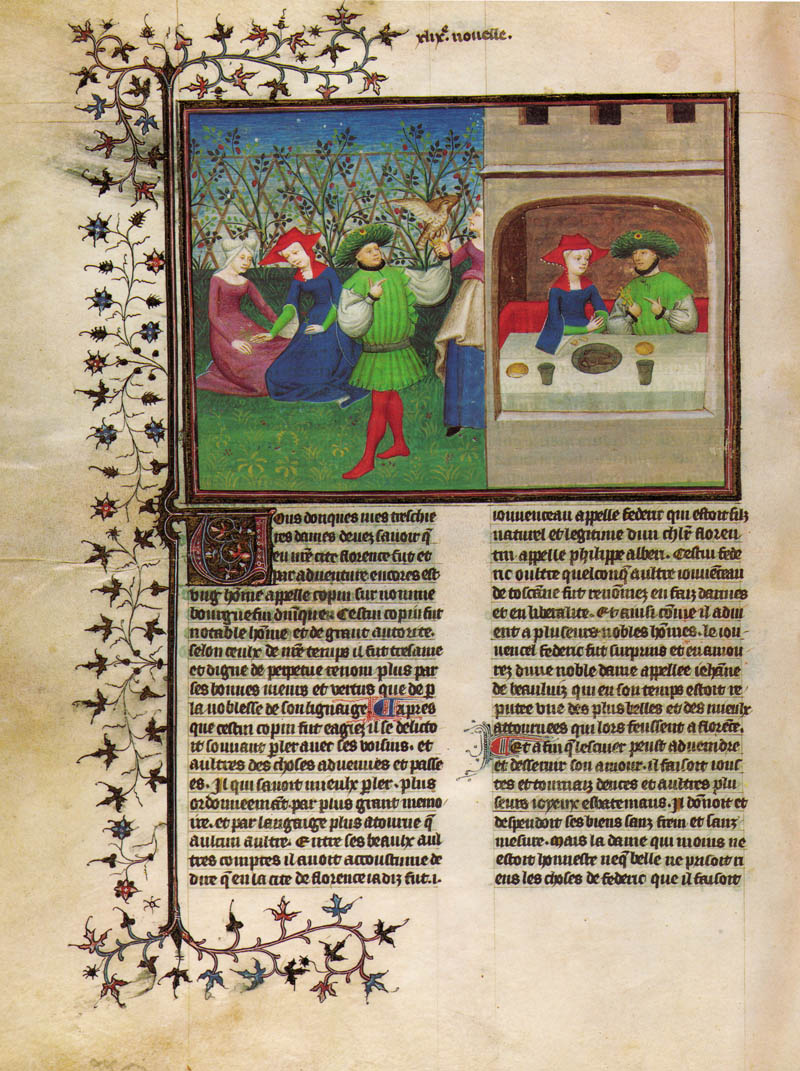 Decameron V 9 Palatinus latinus